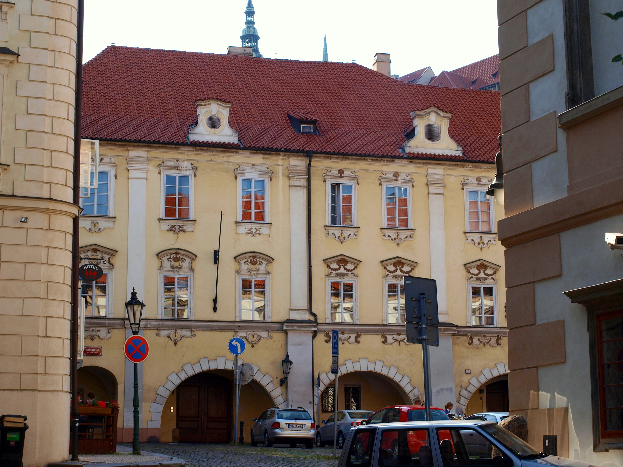 Aueršperský palác